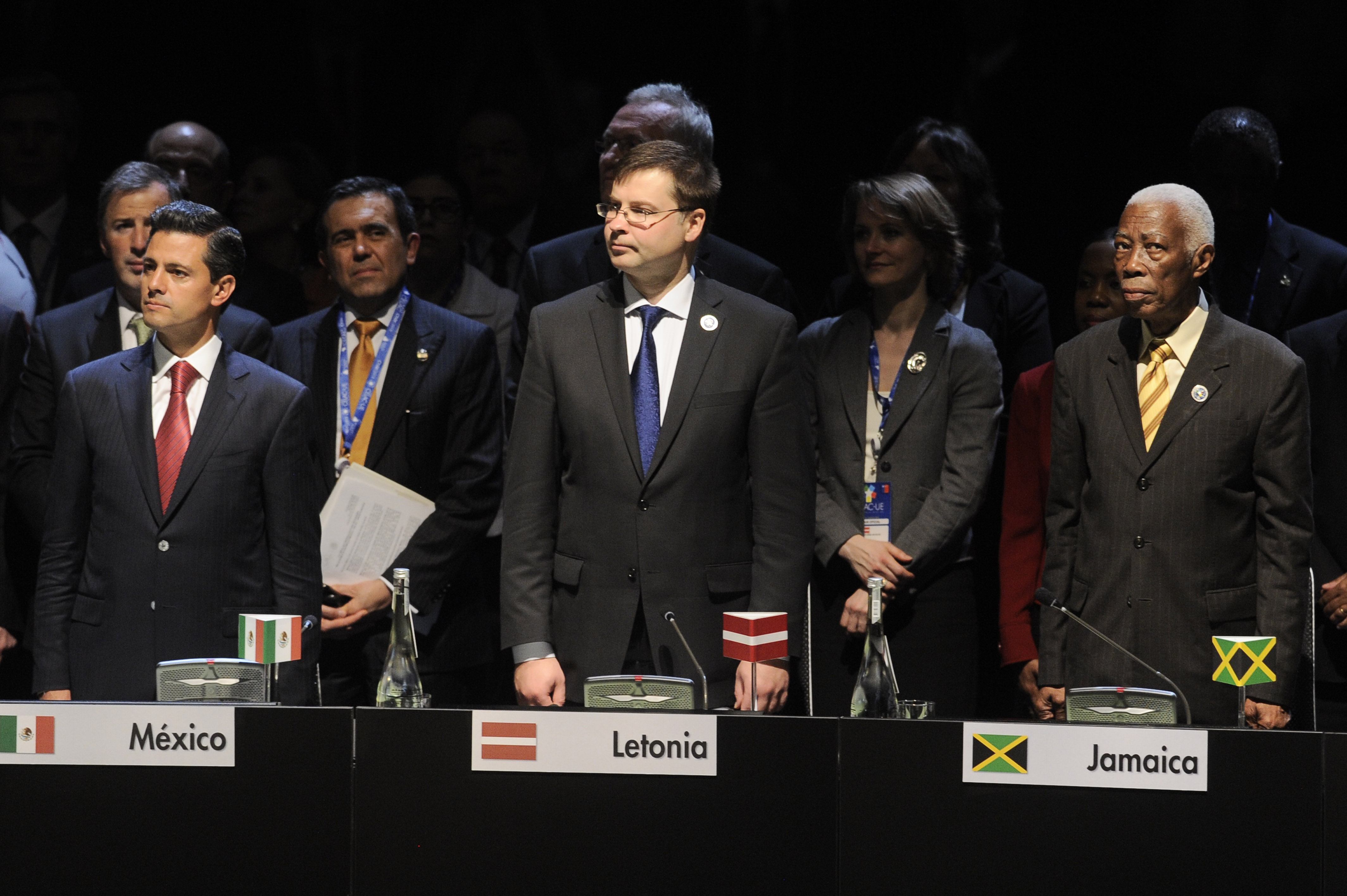 Ministru prezidents Valdis Dombrovskis Čīles galvaspilsētā Santjago piedalās ES un Latīņamerikas un Karību valstu kopienas (CELAC) samitā. No kreisās: Meksikas prezidents Enrike Pena Njeto (Enrique Peña Nieto), V.Dombrovskis un Jamaikas ārlietu un starptautiskās tirdzniecības ministrs senators Arnolds Nikolsons (Arnold Nicholson) FOTO:PABLO OVALLE/AGENCIA UNO/PRENSA CUMBRES